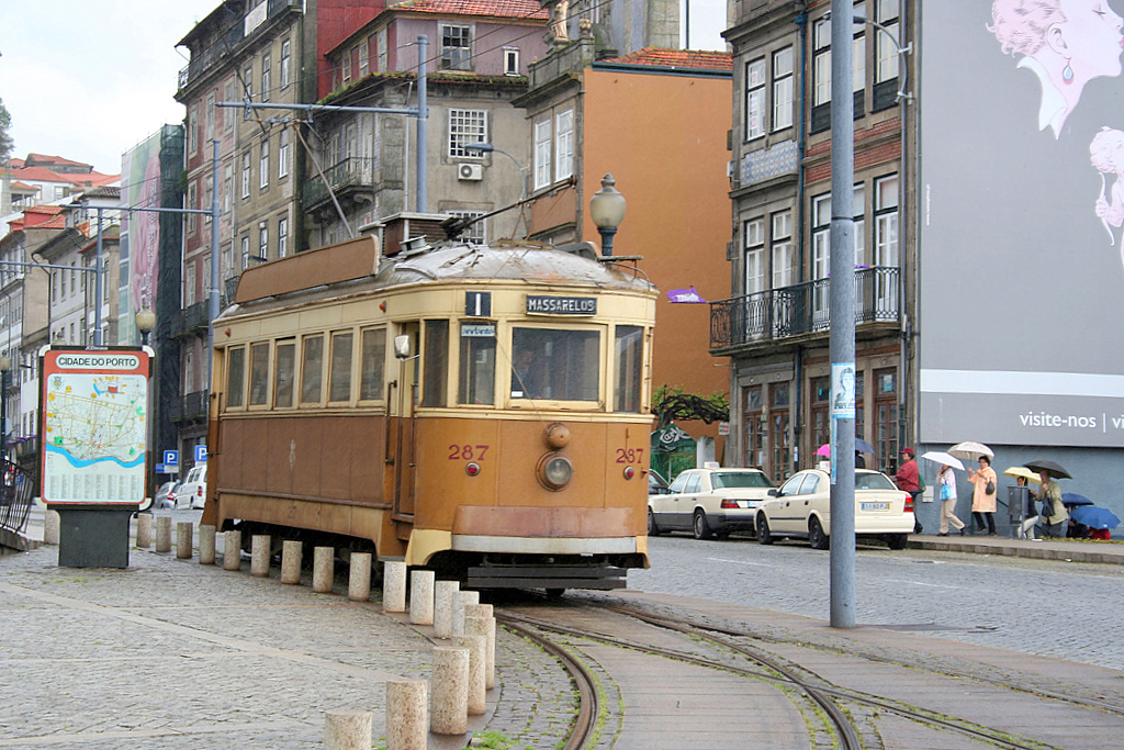 Oporto